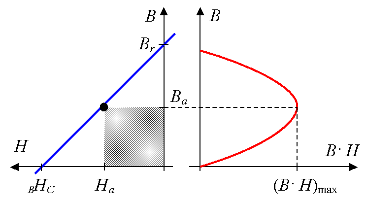 Definition of magnetic energy of permanent magnet. The magnetic energy (red curve) is a product of flux density B and magnetic field strength H. It is calculated for the second quadrant, through which the demagnetising curve (blue colour) is plotted. The magnetic energy takes a maximum (BH)max, at which there is optimum working point (Ba, Ha) of a magnet. Br is the remanence, and BHC is the coercive force. Definicja energii magnetycznej magnesu. Energia magnetyczna (czerwona krzywa) jest obliczana jako iloczyn indukcji magnetycznej B i natężenia pola magnetycznego H dla krzywej odmagnesowania znajdującej się w drugiej ćwiartce wykresu (niebieska krzywa). Wartość energii magnetycznej przyjmuje maksimum, dla którego znajduje się optymalny punkt pracy magnesu (Ba, Ha). Br oznacza remanencję, a BHC koercję.